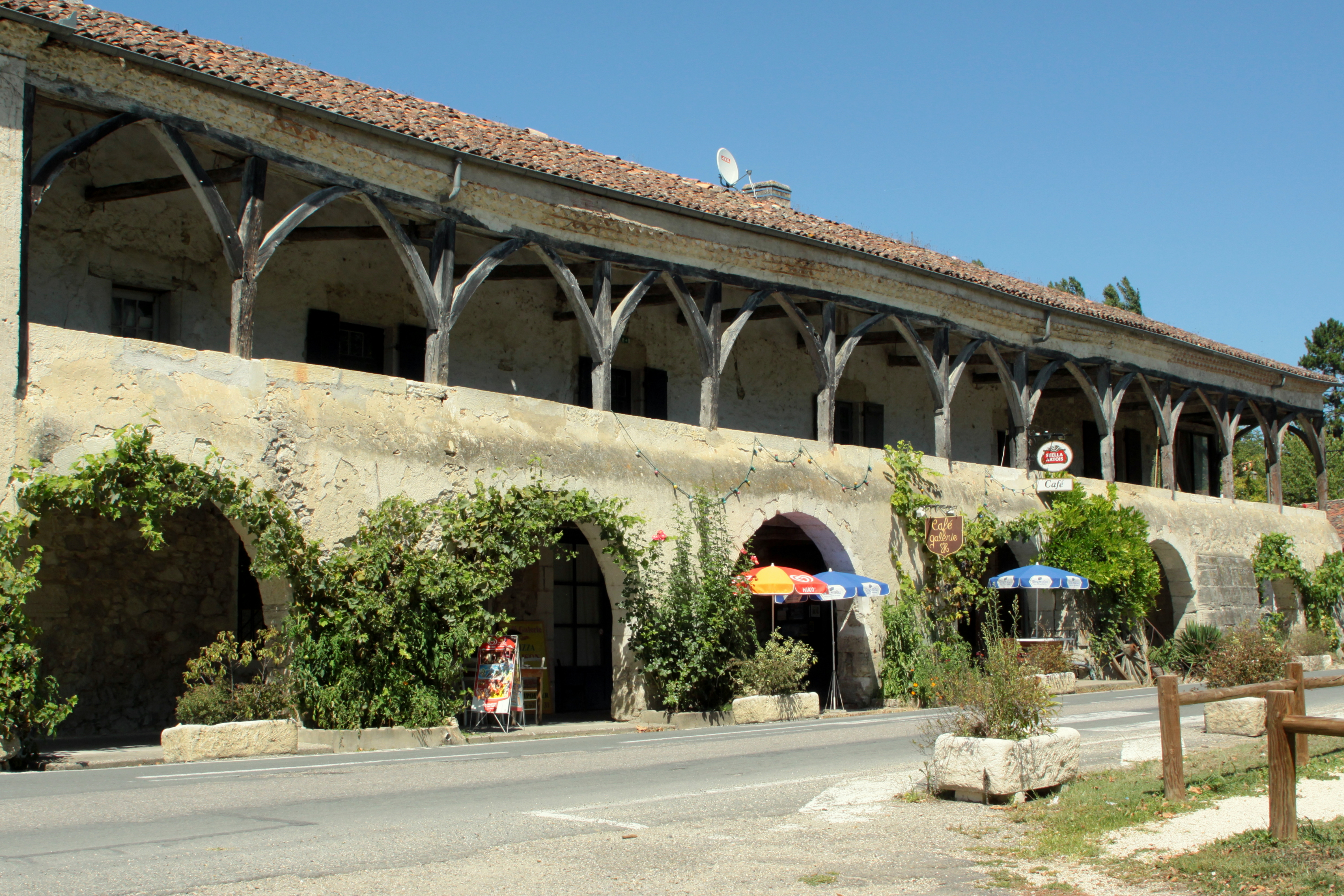 D'Arcade laanscht d'Gélise